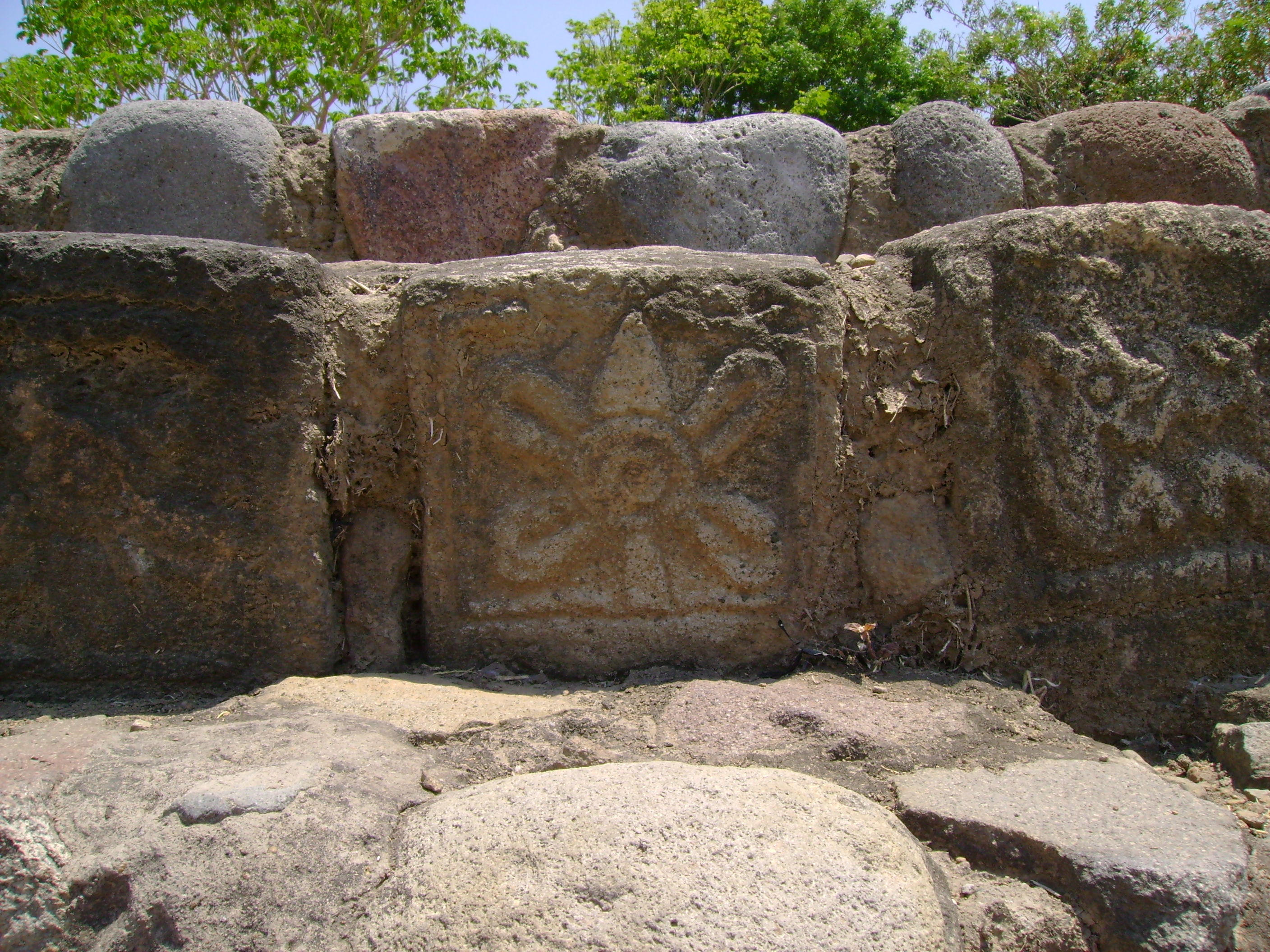 Simbolo de Ollin en El Chanal, Colima